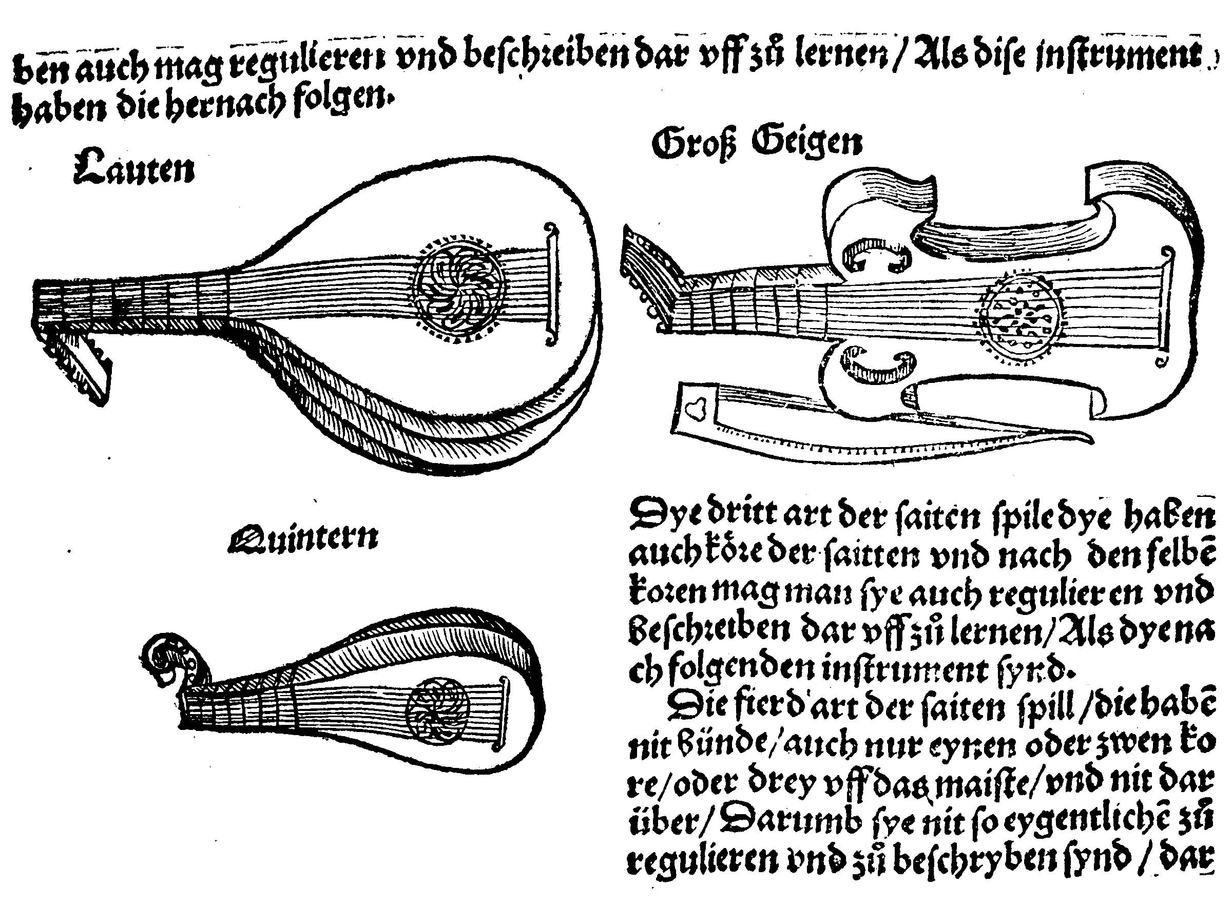 Illustração do tratado "Musica Getutsch", de Sebastian Virdung, 1511, Alemanha, mostrando os instrumetnos da família do alaúde, tocados por vibração (plectro) ou arco. Primeira ilustração impressa de uma viola da gamba (ou vihuela de arco) na história.